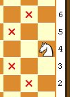 billede skabt fra template - GNU